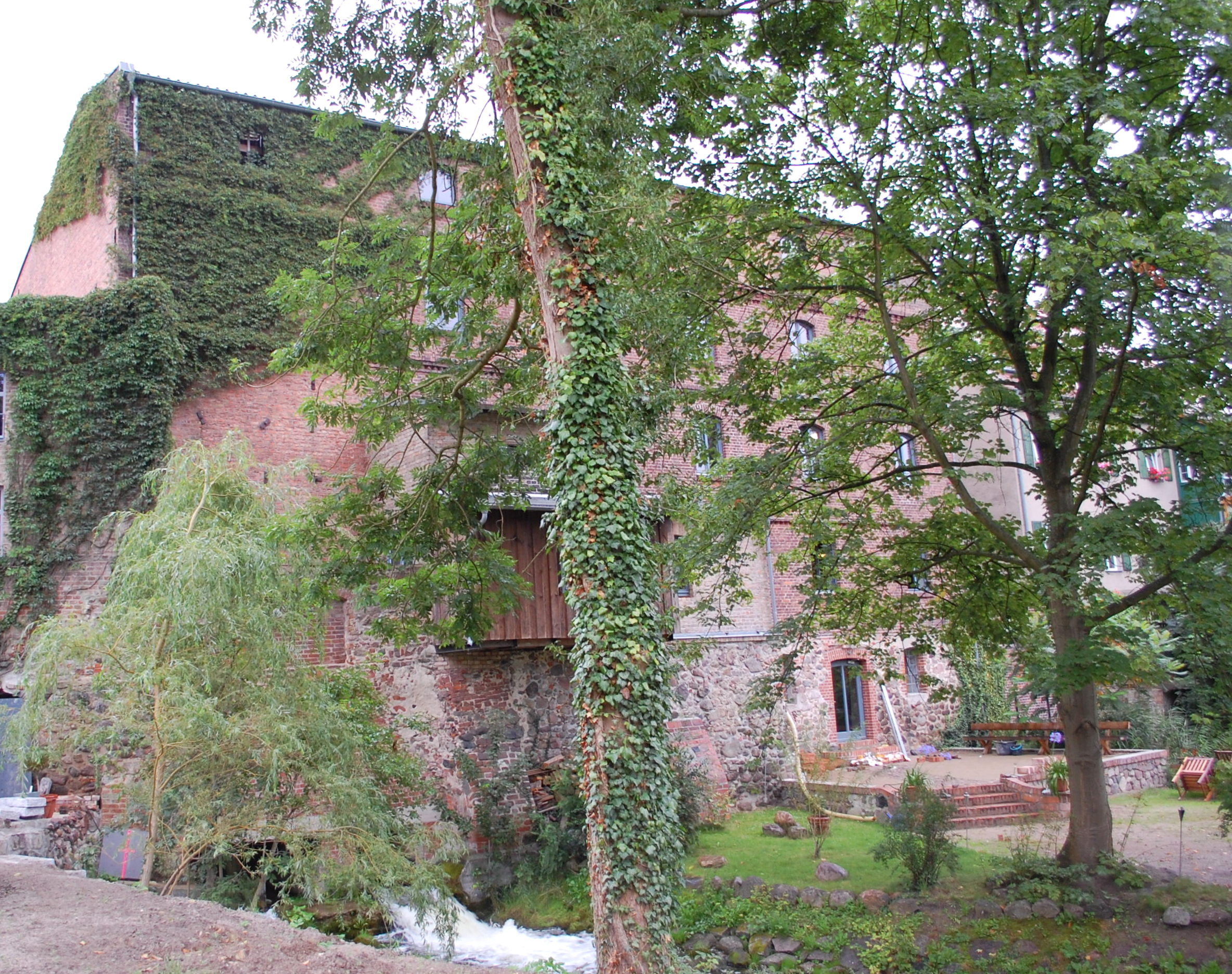 Mühle in Templin, nahe Mühlentor